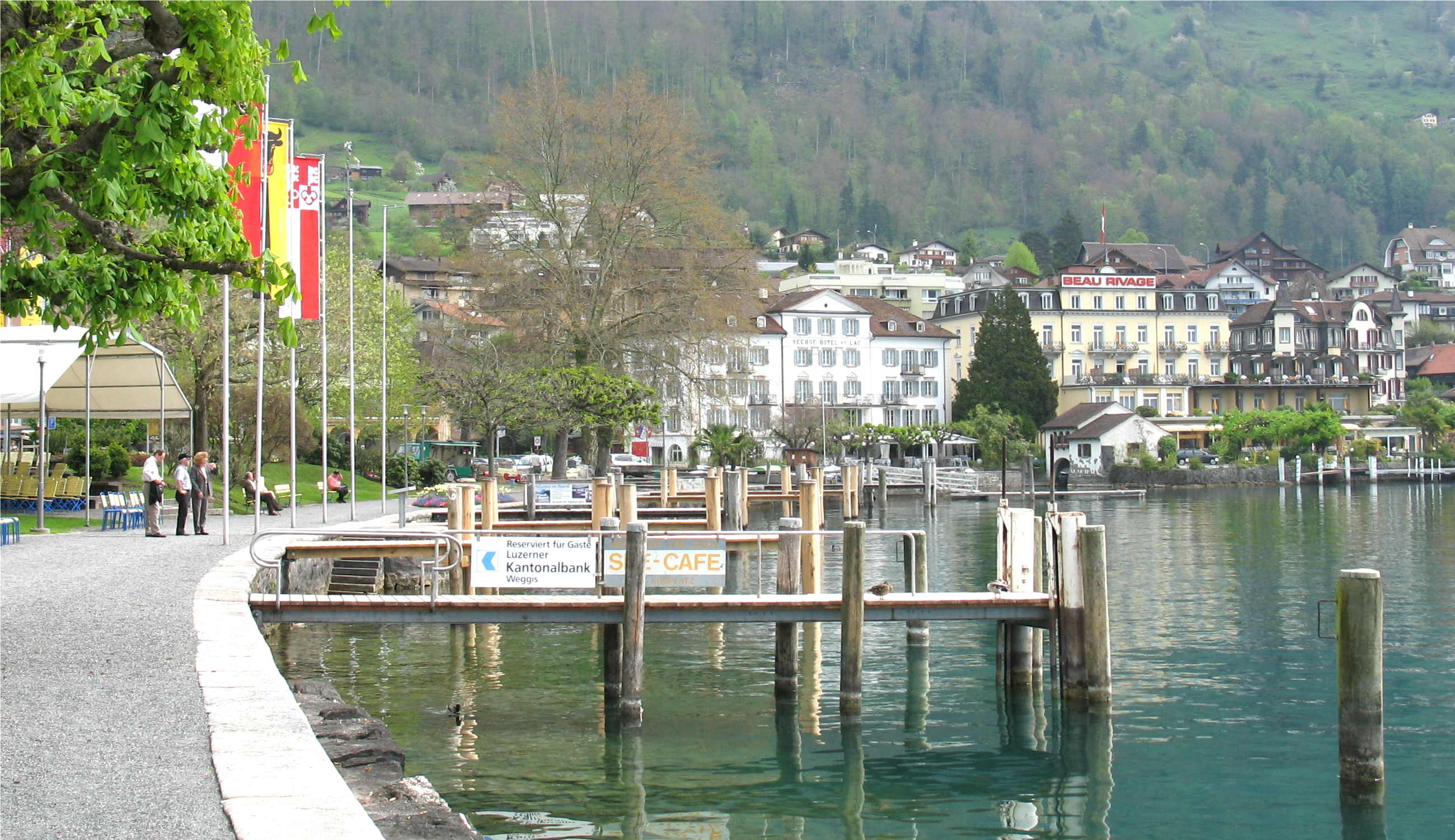 Weggis (Schwäiz)